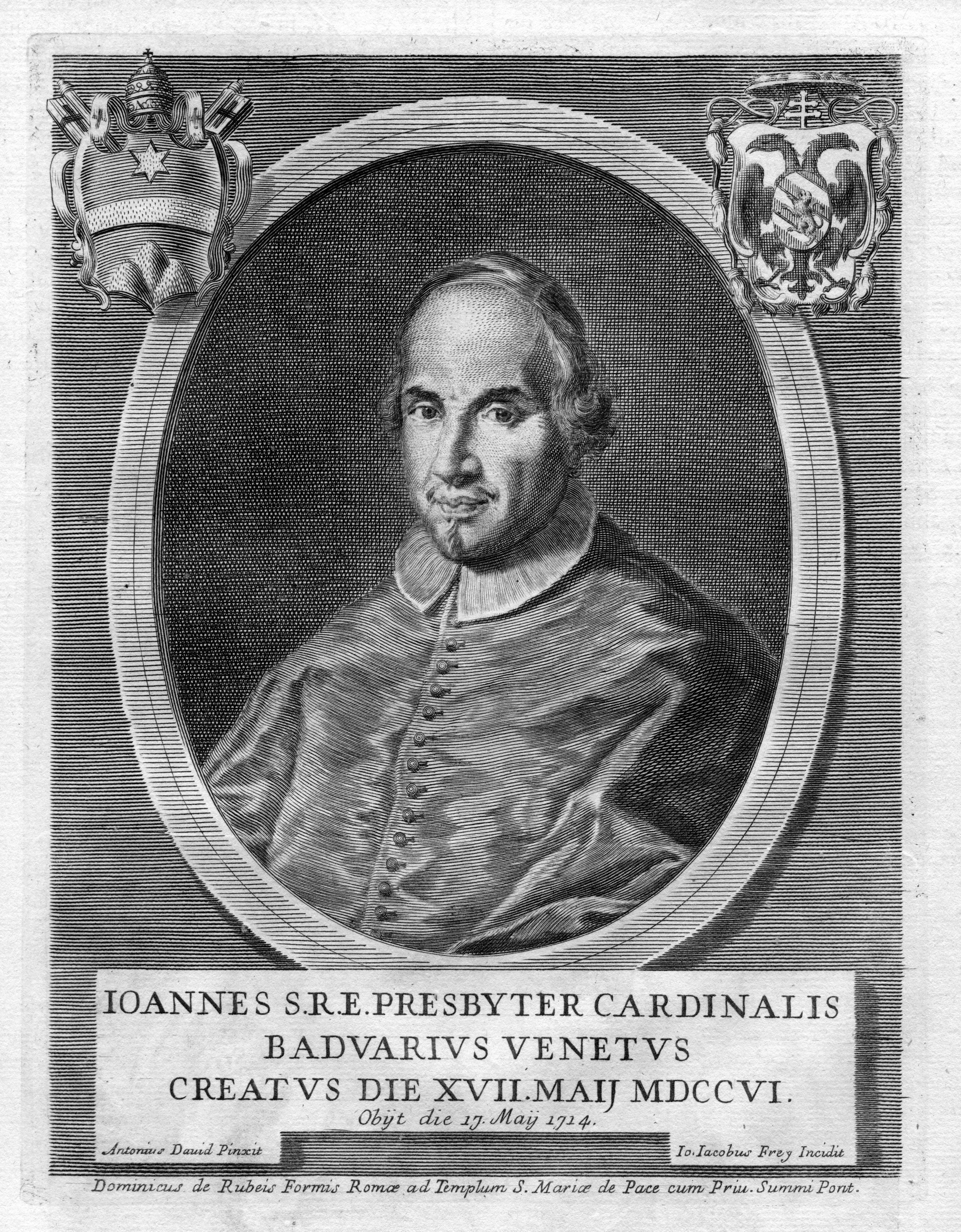 Portrait de Gianalberto Badoaro (1649-1714)